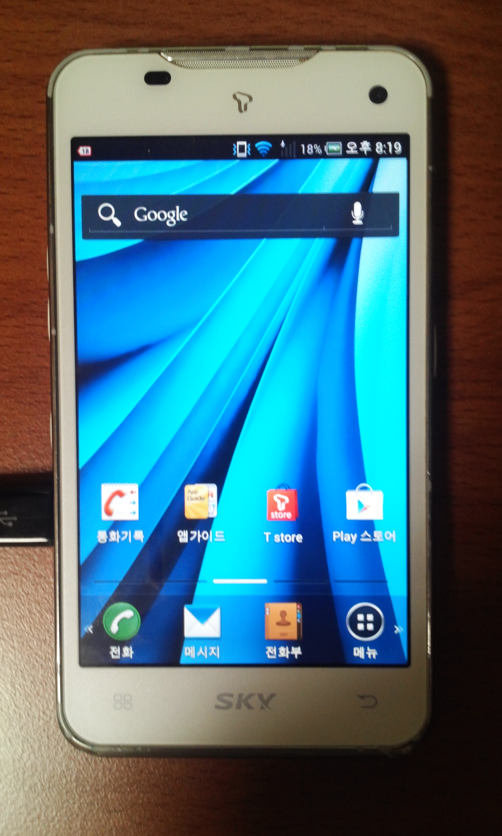 베가LTE의 홈 화면